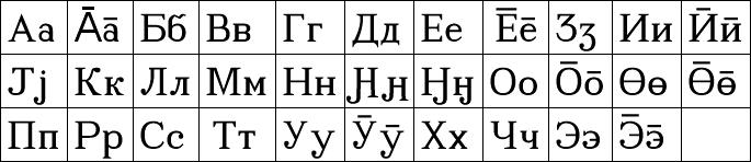 Orok alphabet 2008